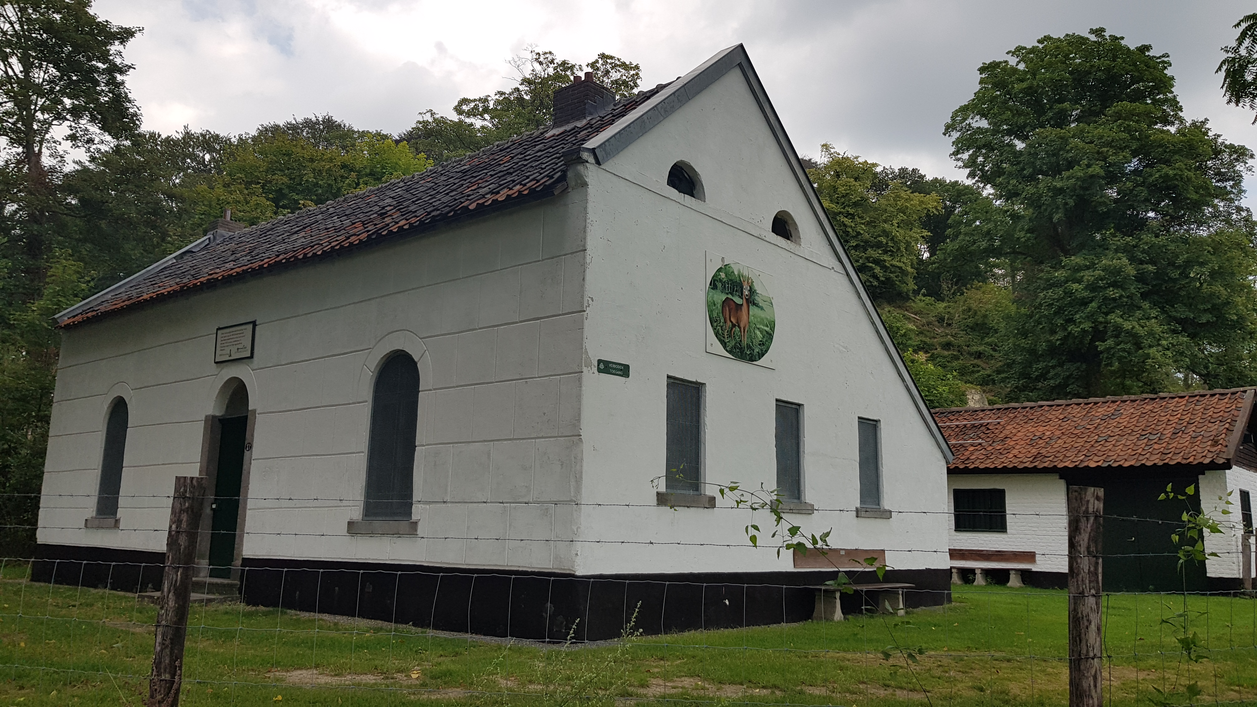 Huis De Beuk in het Savelsbos, Gronsveld, Nederland